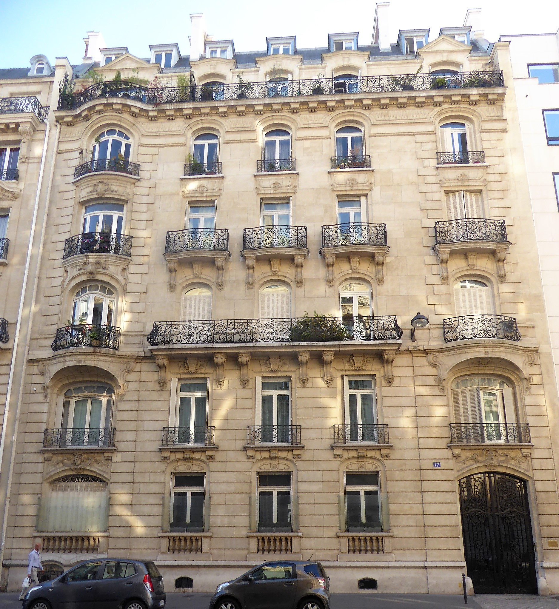 Rue Alhonse de Neuville 17 immeuble néo-rococo